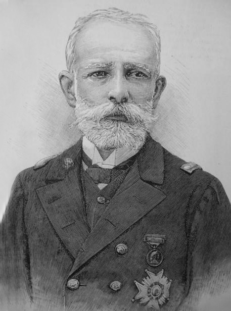 Grabado del General Patricio Montojo y Pasarón